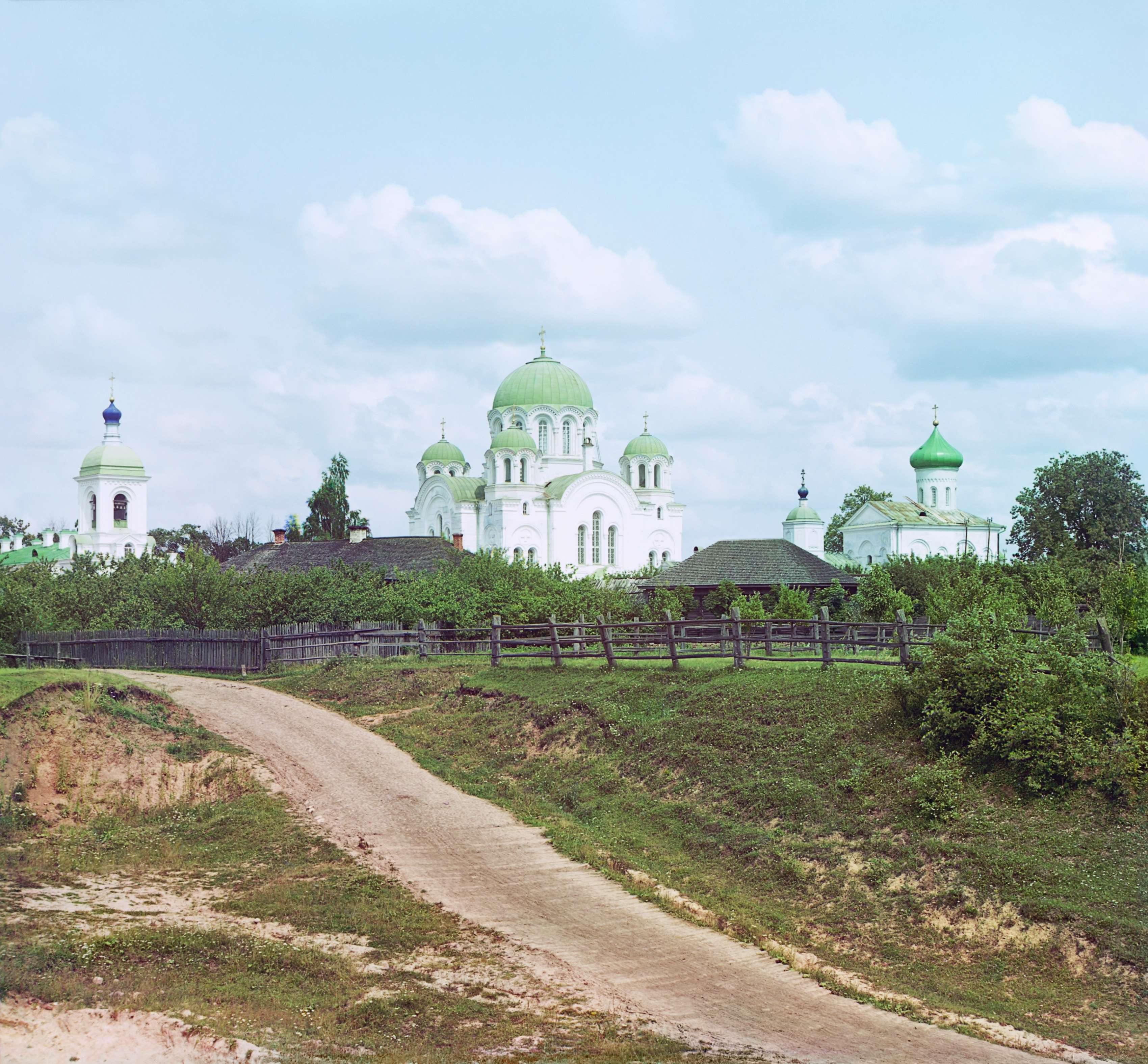 Беларуская (тарашкевіца): Спаскі манастыр